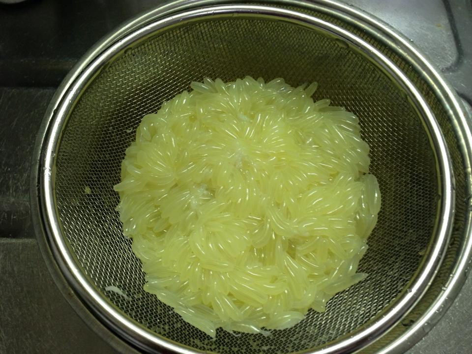 たこまんまをバラしたところ